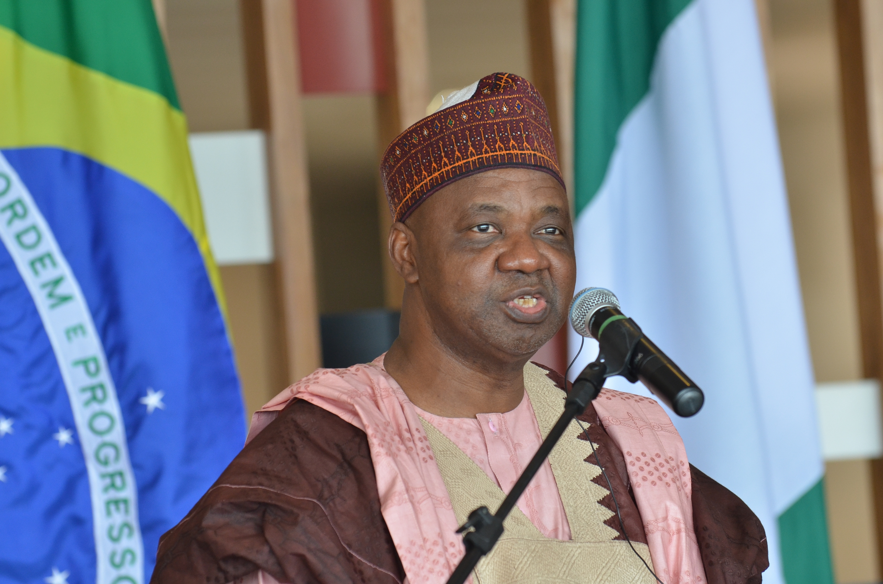 Brasília - O vice-presidente da Nigéria, Namadi Sambo, concede declaração à imprensa, no Palácio Itamaraty.